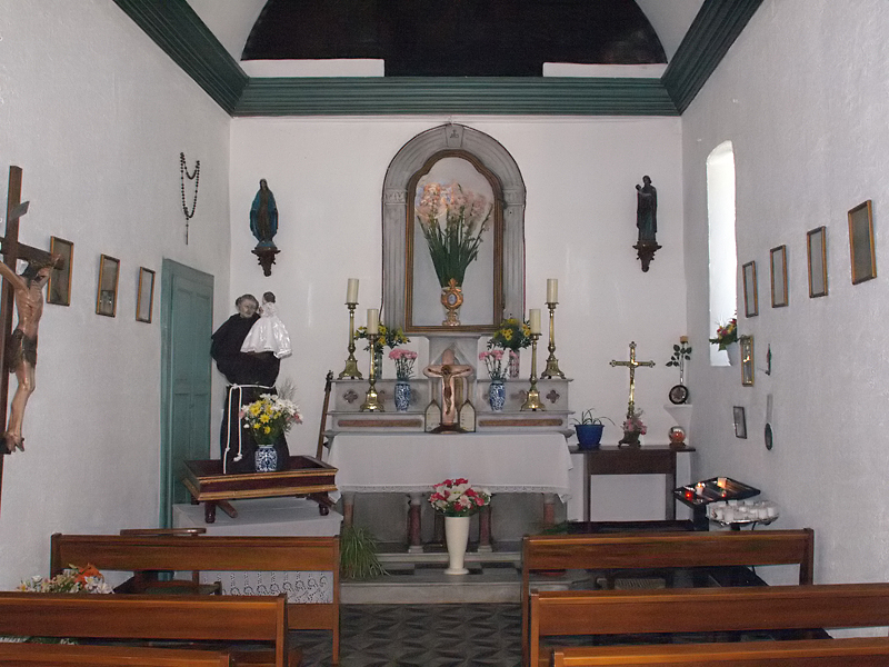 L'Oratoire Saint-Antoine de Padoue